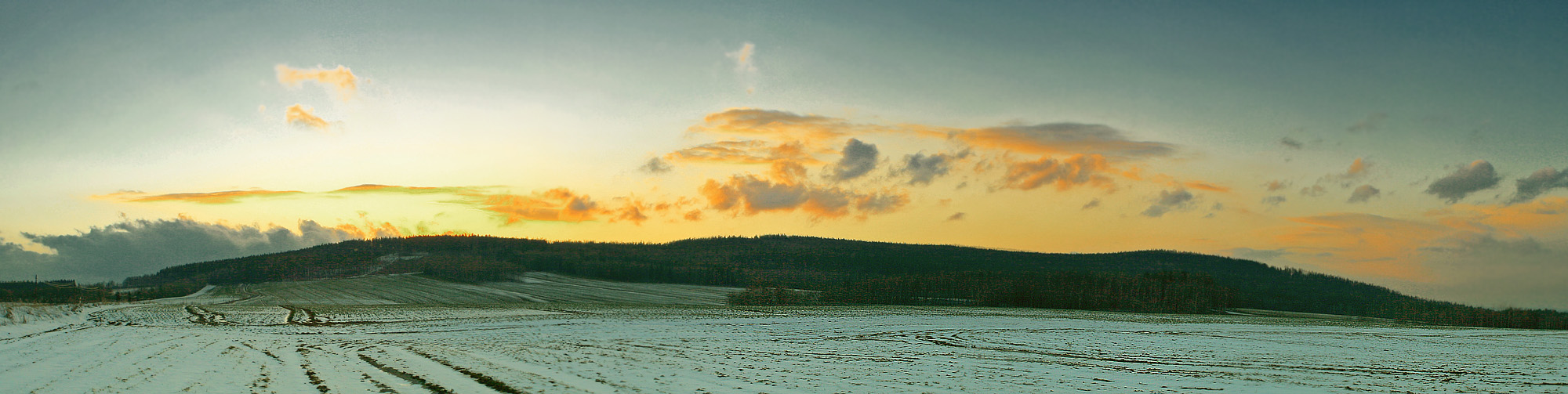 Góra Parkowa (Chrobrego)